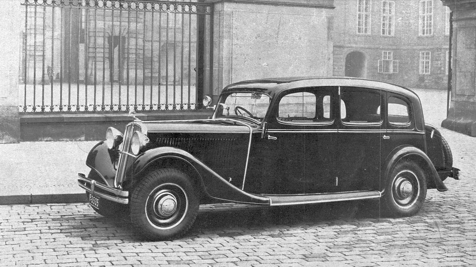 luxusní limuzína Škoda 650 (1934)